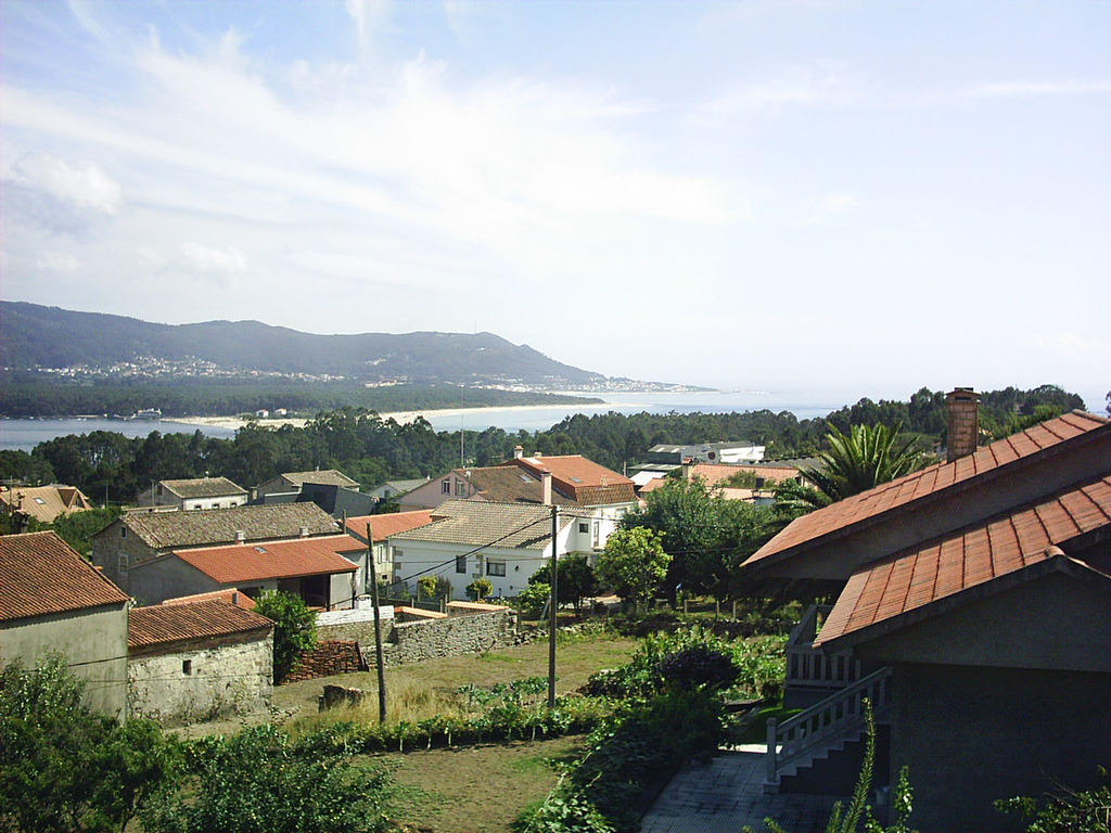 Desembocadura do río Miño, En Canposancos (A Guarda, Galicia)